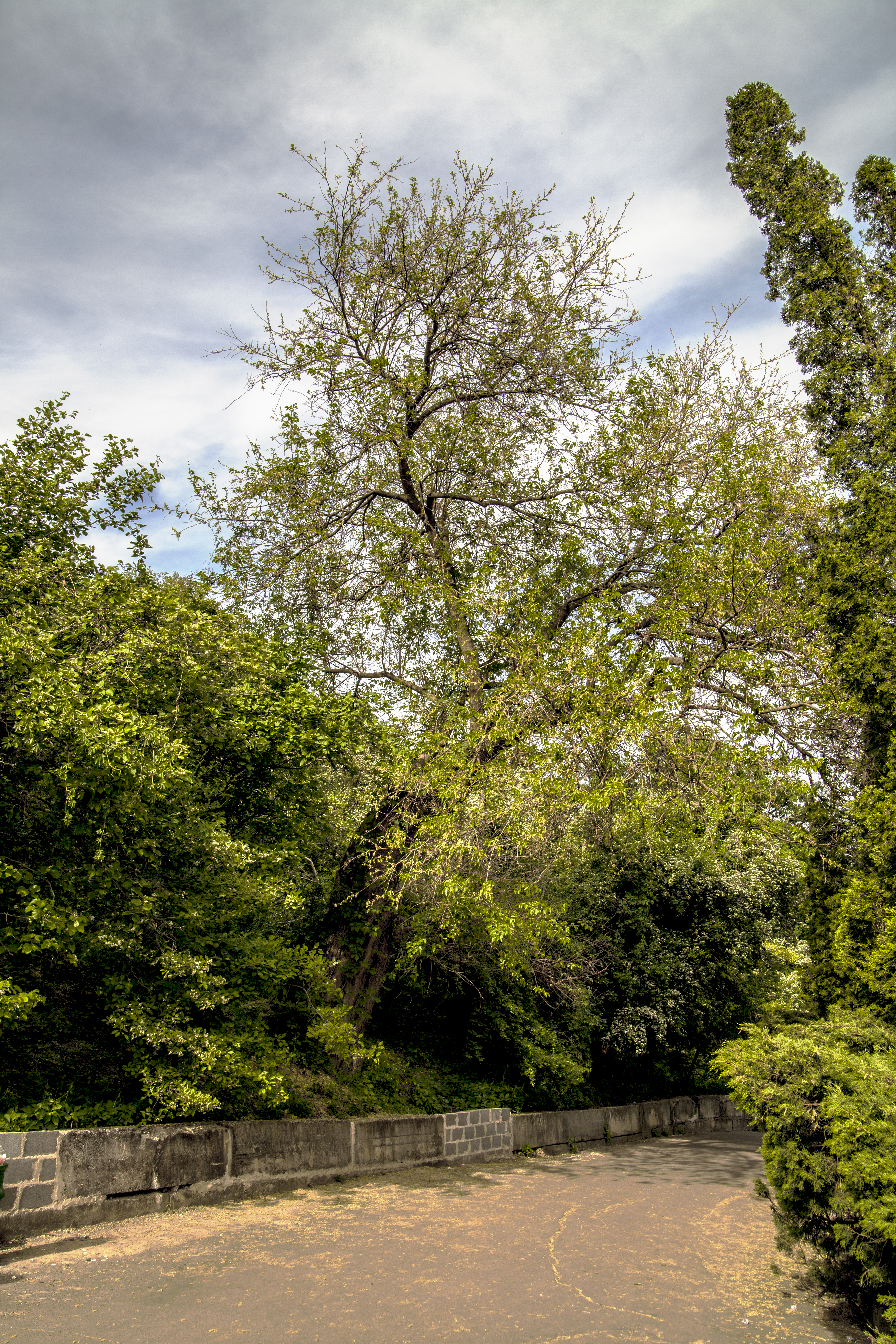 Близько 500 років. Обсяг 3,4 м. Висота 10 м.